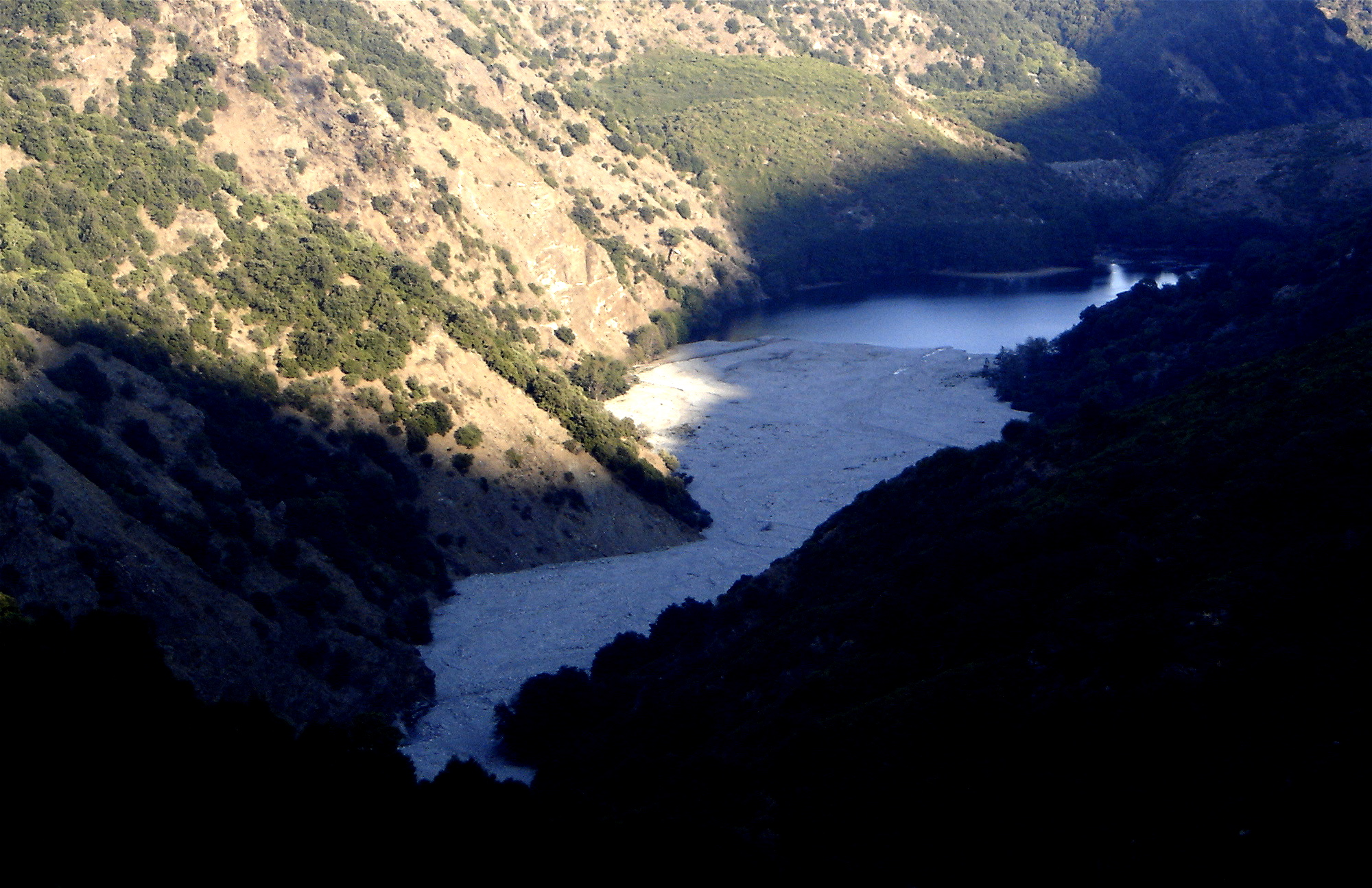 Lago Costantino, Calabria, Italy.